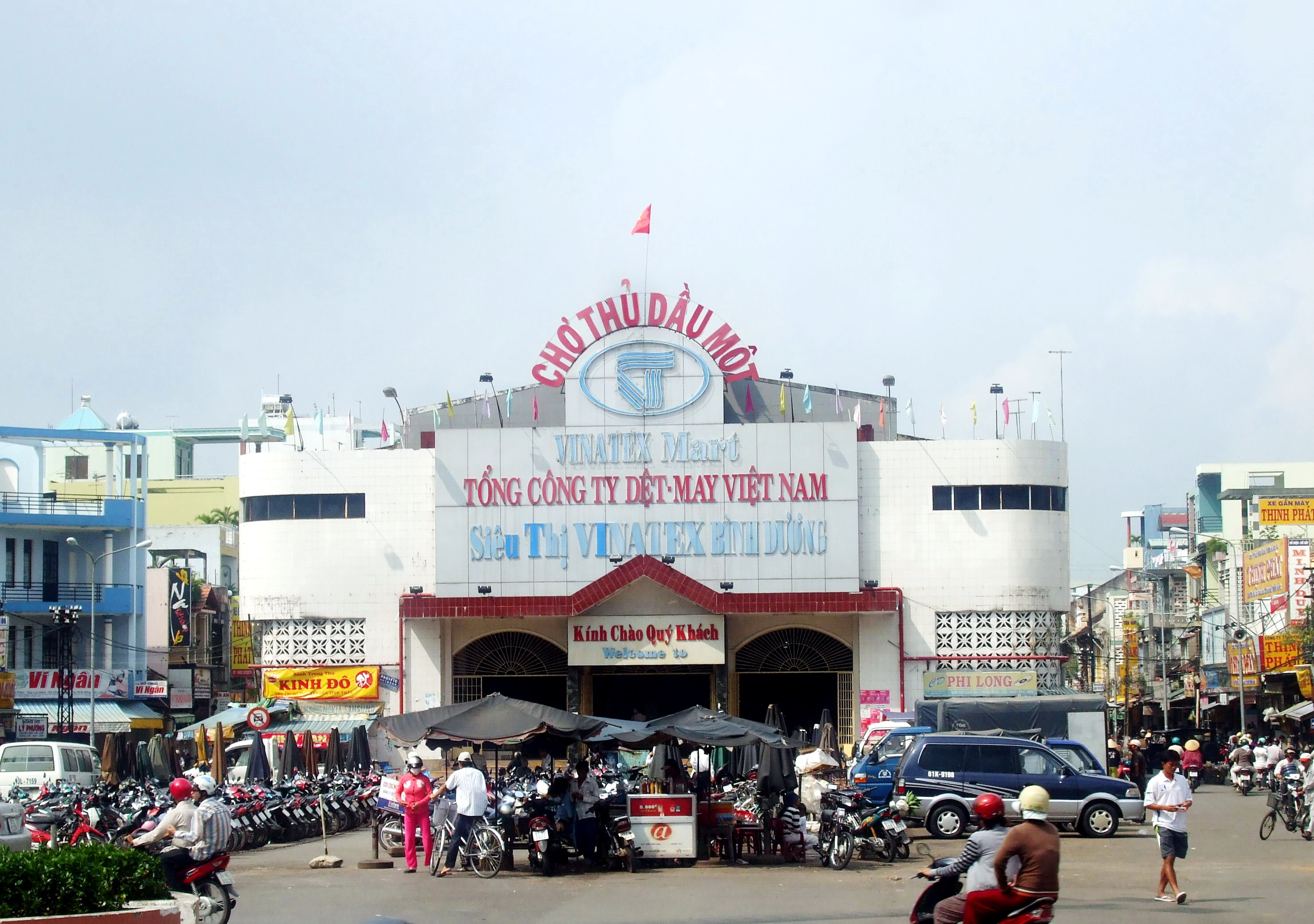 Chợ Thủ Dầu Một thuộc thành phố Thủ Dầu Một, tỉnh Bình Dương, Việt Nam.